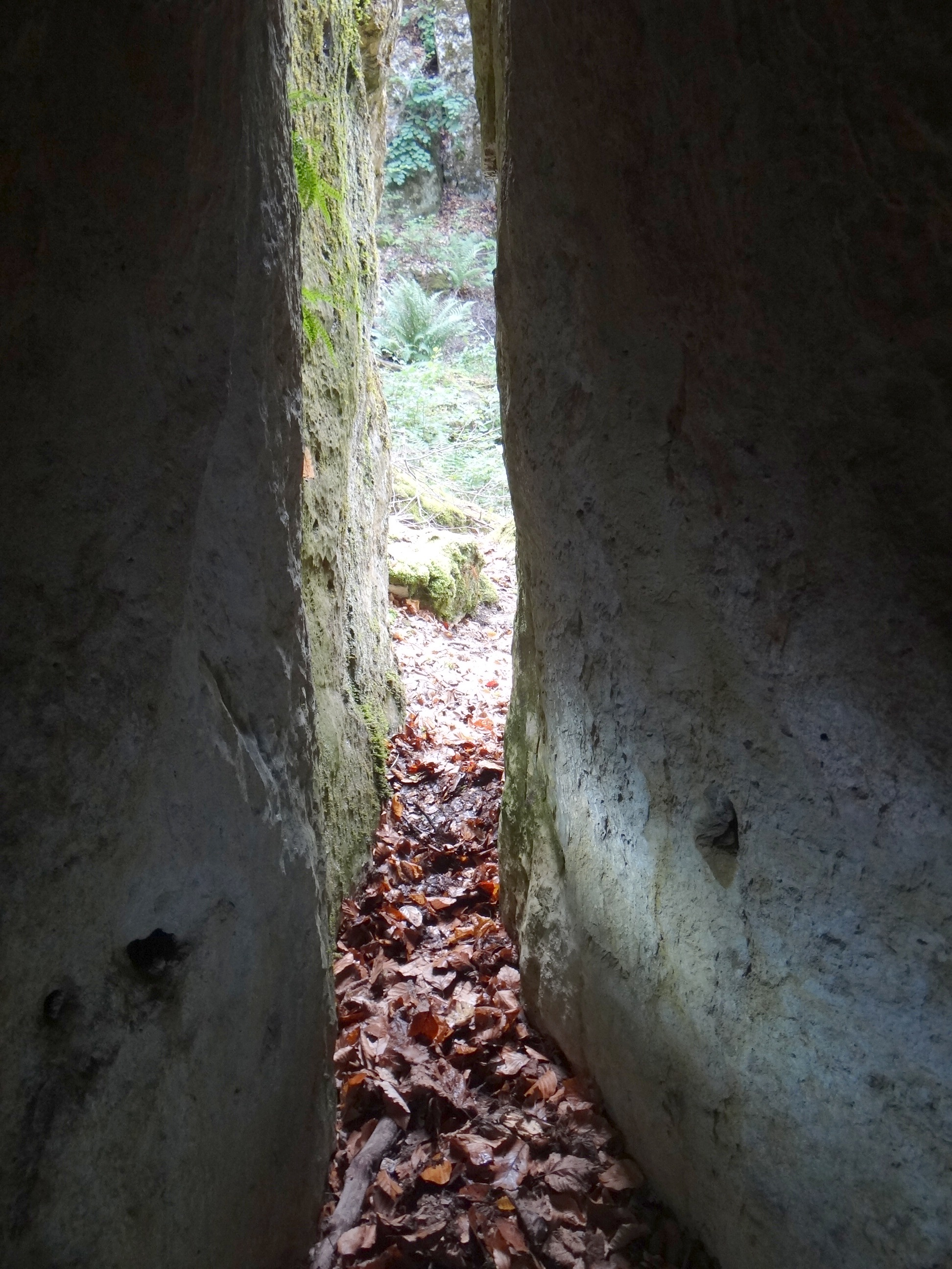 Szczelina w Popielowej Górze